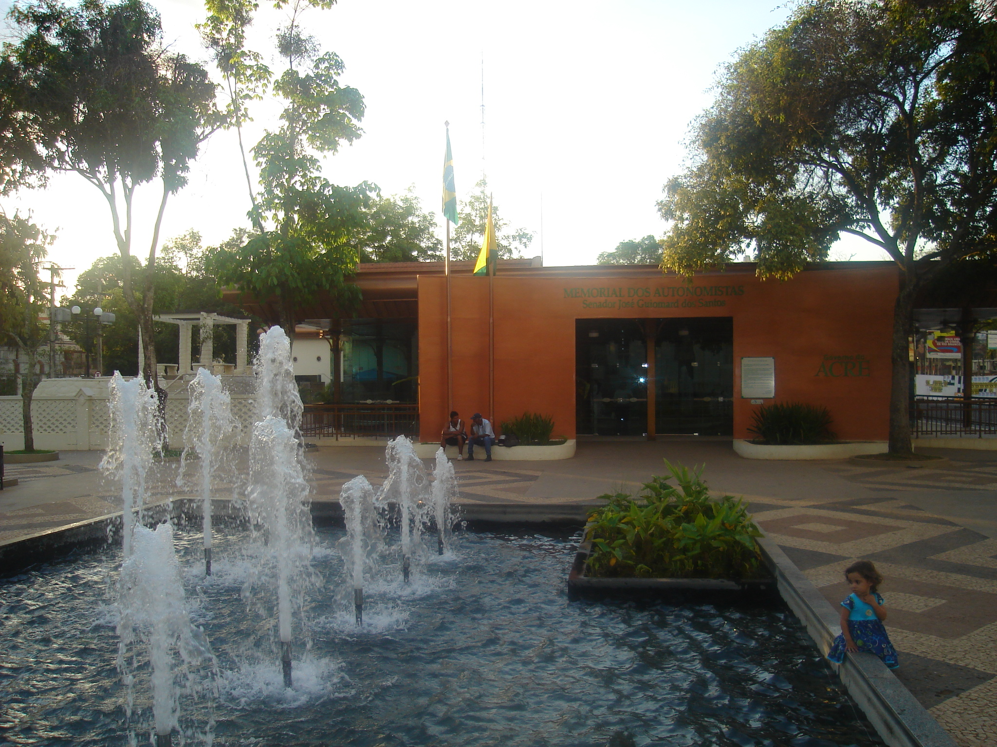 Memorial dos Autonomistas no Centro de Rio Branco, Acre Fonte Autor: Filipe Mesquita de Oliveira --Filipe Mesquita responde20px 01:57, 27 Julho 2006 (UTC)